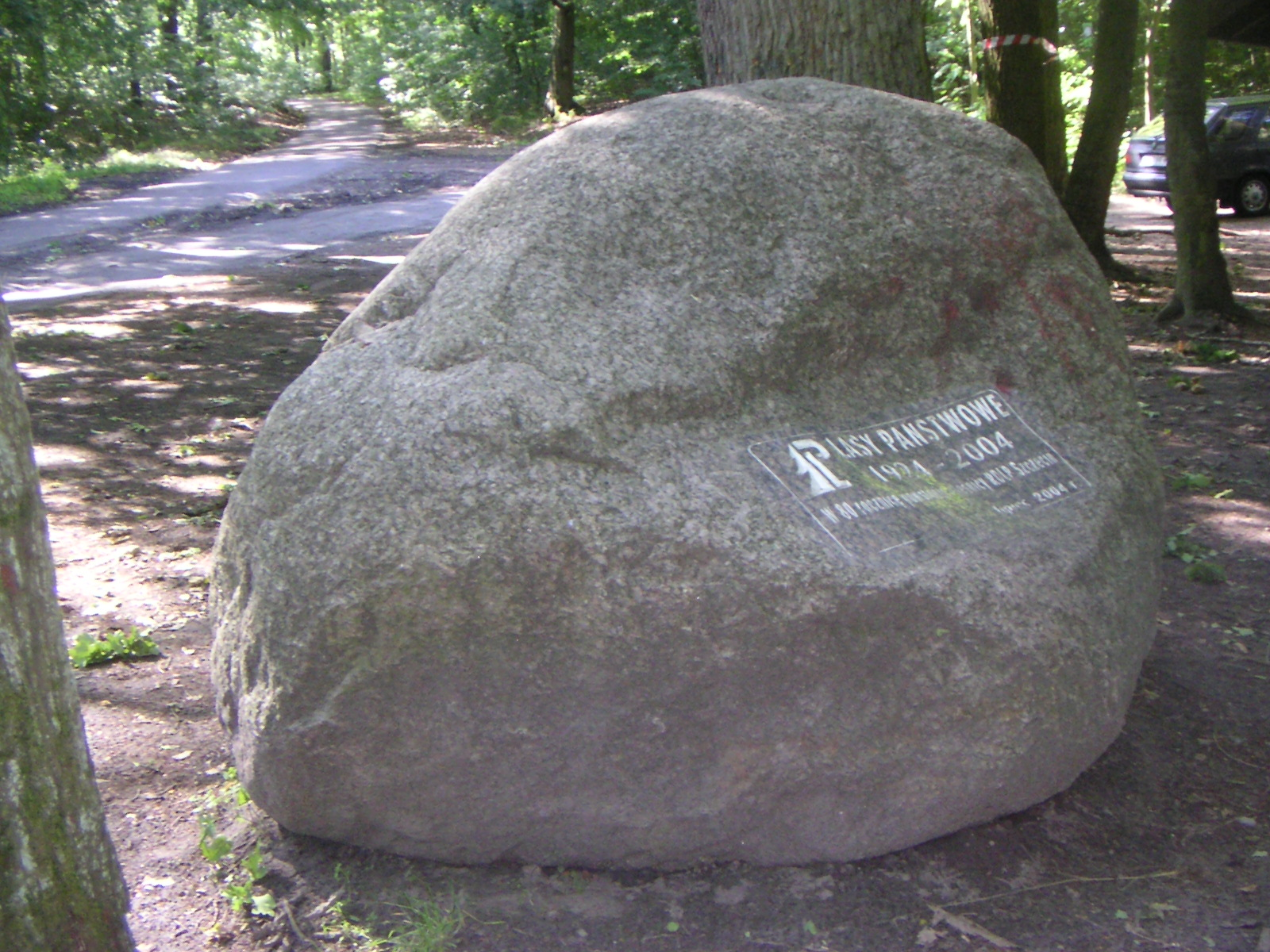 Szczeciński Park Krajobrazowy "Puszcza Bukowa", uroczysko Kołówko, głaz "Serce Puszczy"